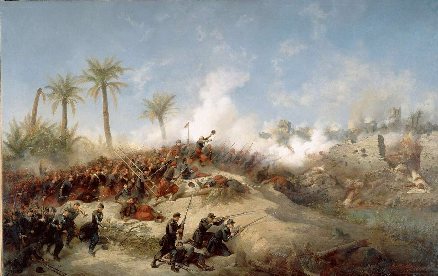 Prise d’assaut de Zaatcha par le colonel Canrobert, le 26 novembre 1849.